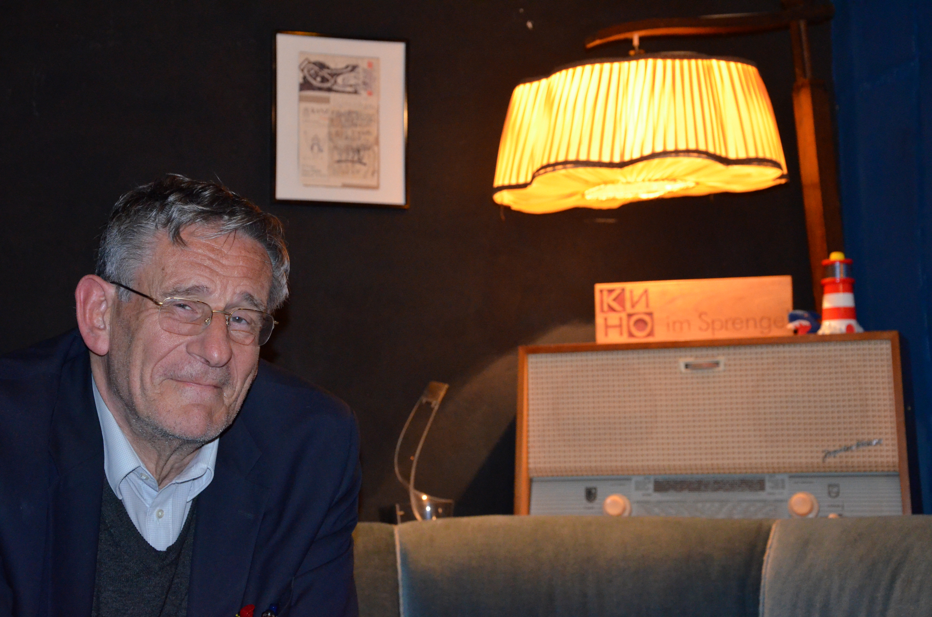 Zum Festival der Philosophie 2014 in Hannover unter dem Titel Wie bitte geht Gerechtigkeit? hielt Professor Hinderk Emrich im Kino im Sprengel unter anderem einen Vortrag zum Thema "Entfremdung, Anrufung und innerer Prozess". Dabei behandelte den Roman Der Process von Franz Kafka, um anschließend in die kongeniale Verfilmung des Stoffes durch Orson Welles einzuführen. Bei dieser Gelegenheit stellte Hinderks Kollege Wiebrecht Ries sein Buch über Kafka vor ...